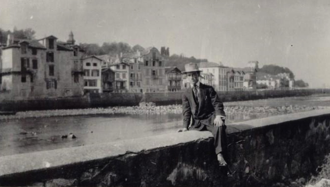 Maurice Ravel sur les bords de la Nivelle dans sa ville natale de Ciboure, Pyrénées-Atlantiques.